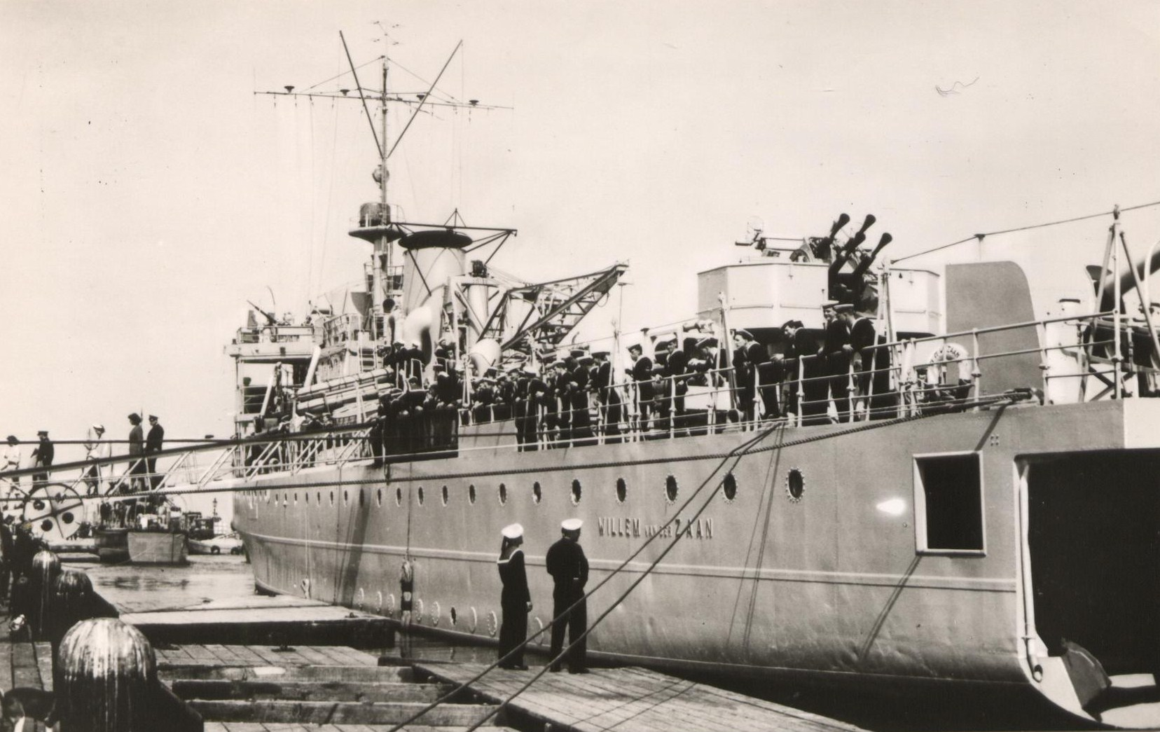 Mijnenlegger F 824 Willem vd Zaan vertrekt naar de Nederlandse Antillen. Gebouwd 1939, uit dienst gesteld en gesloopt in 1959.